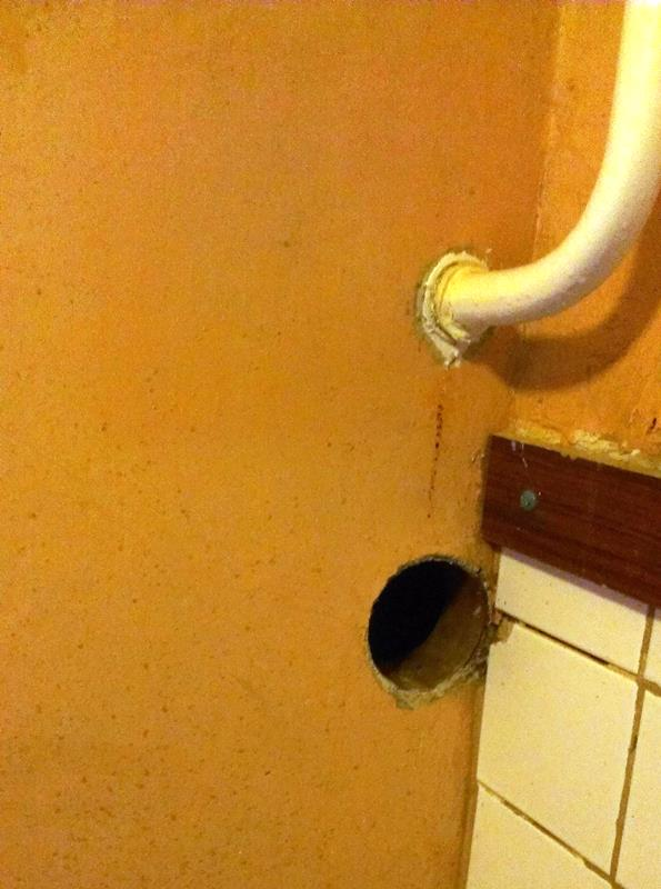 Дымоход для кухонных плит на кухне дома сделанный архитекторами при посторйке в 1936 г.